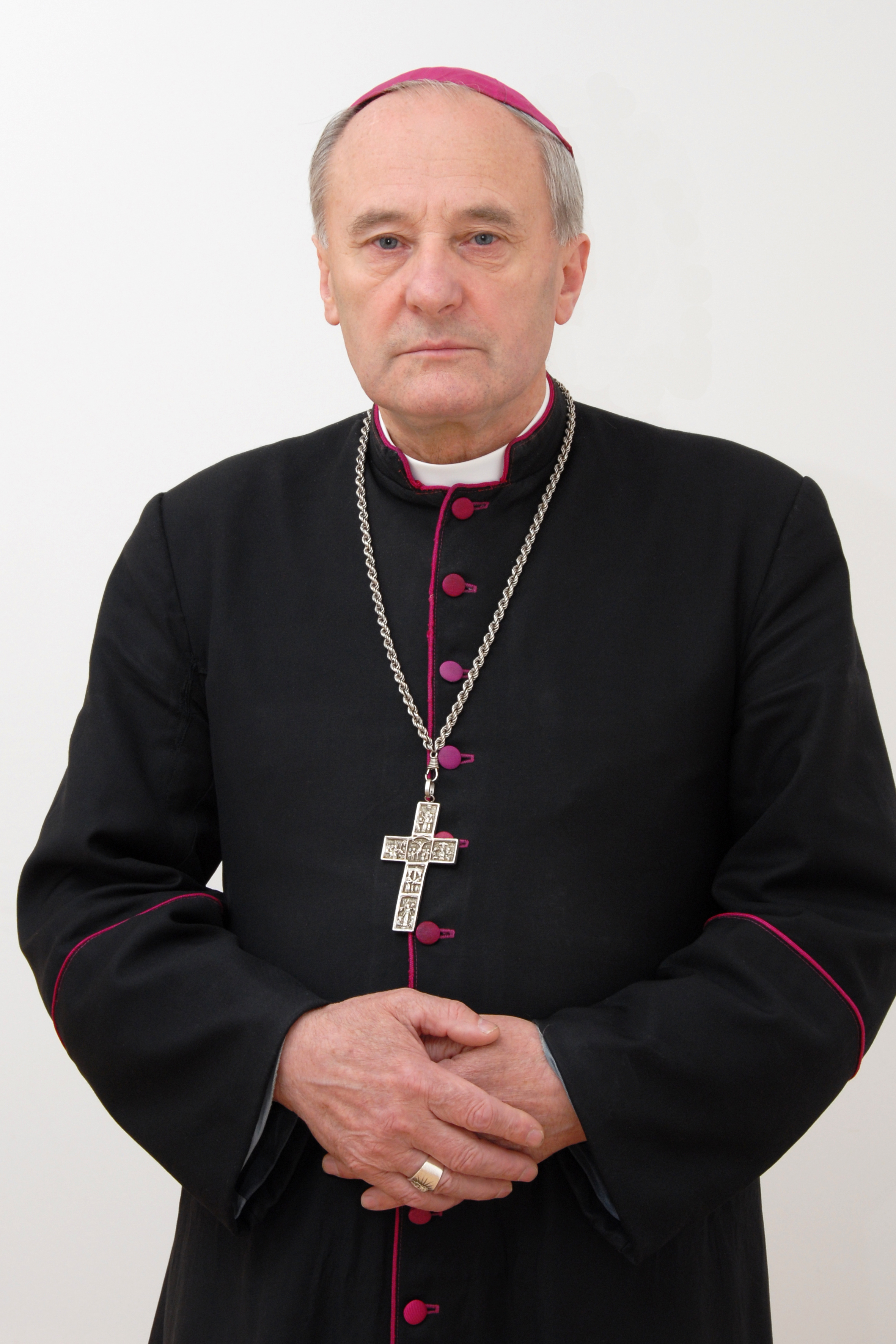 Дапаможны біскуп Пінскай дыяцэзіі Казімір Велікаселец